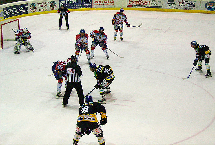 face-off Asiago Hockey (in maglia bianca e rossa) vs HC Pustertal (26/12/2007).